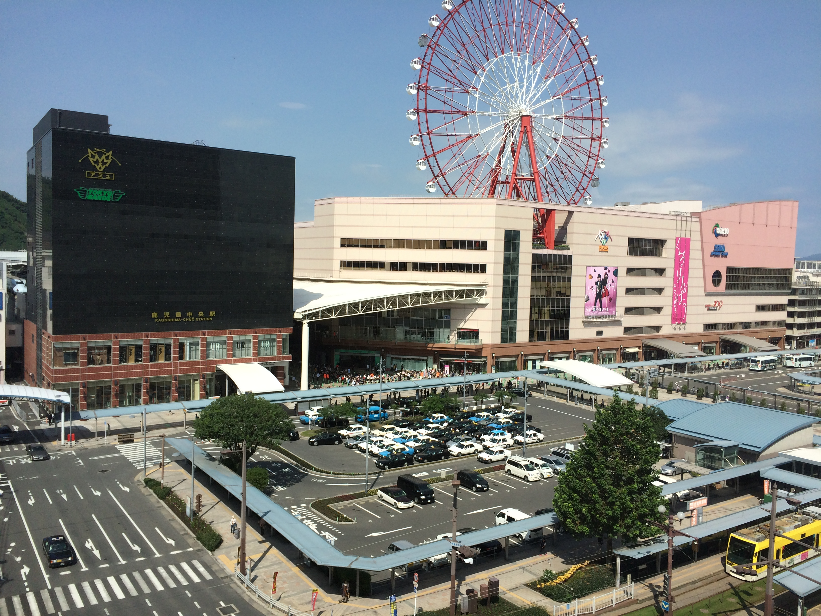 鹿児島中央駅全景